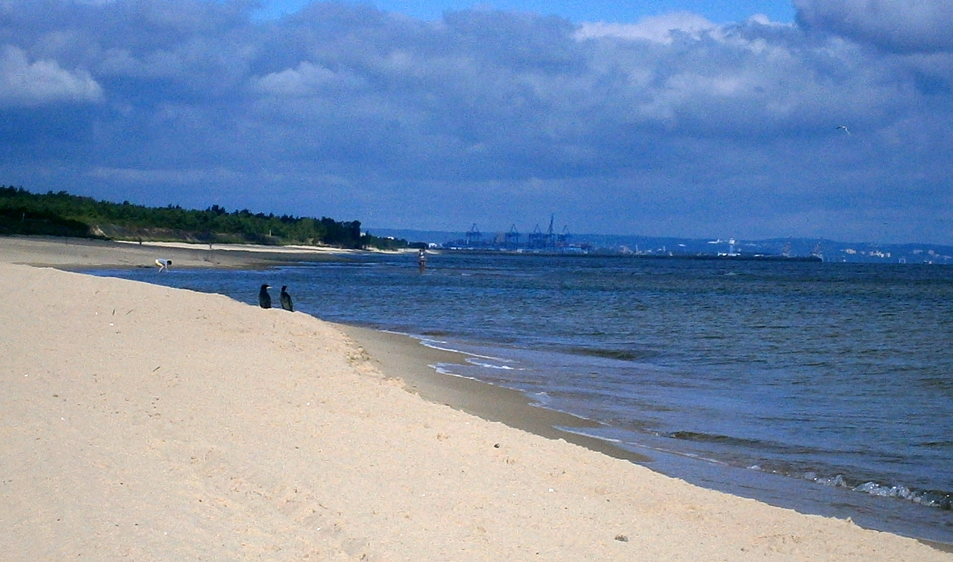 Plaża na Wyspie Sobieszewskiej, ranek, kormorany.